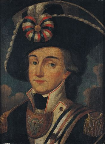 Беларуская (тарашкевіца): Якуб Ясінскі